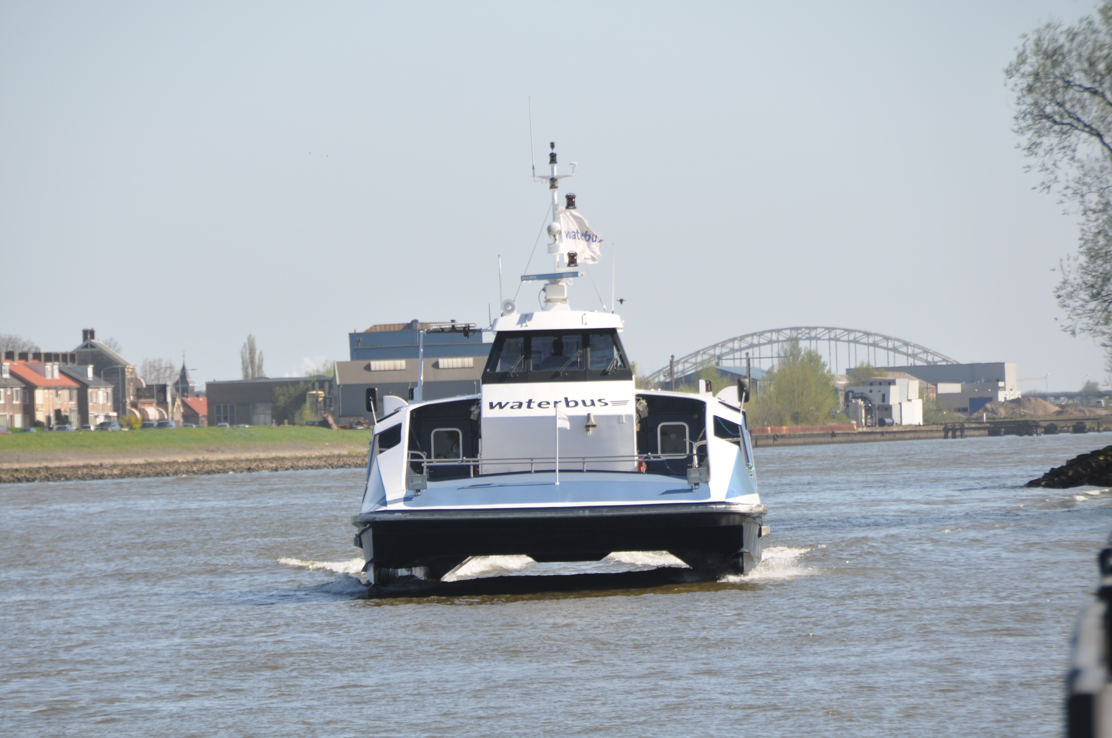 De WANTIJ aan de halte Slikkerveer.